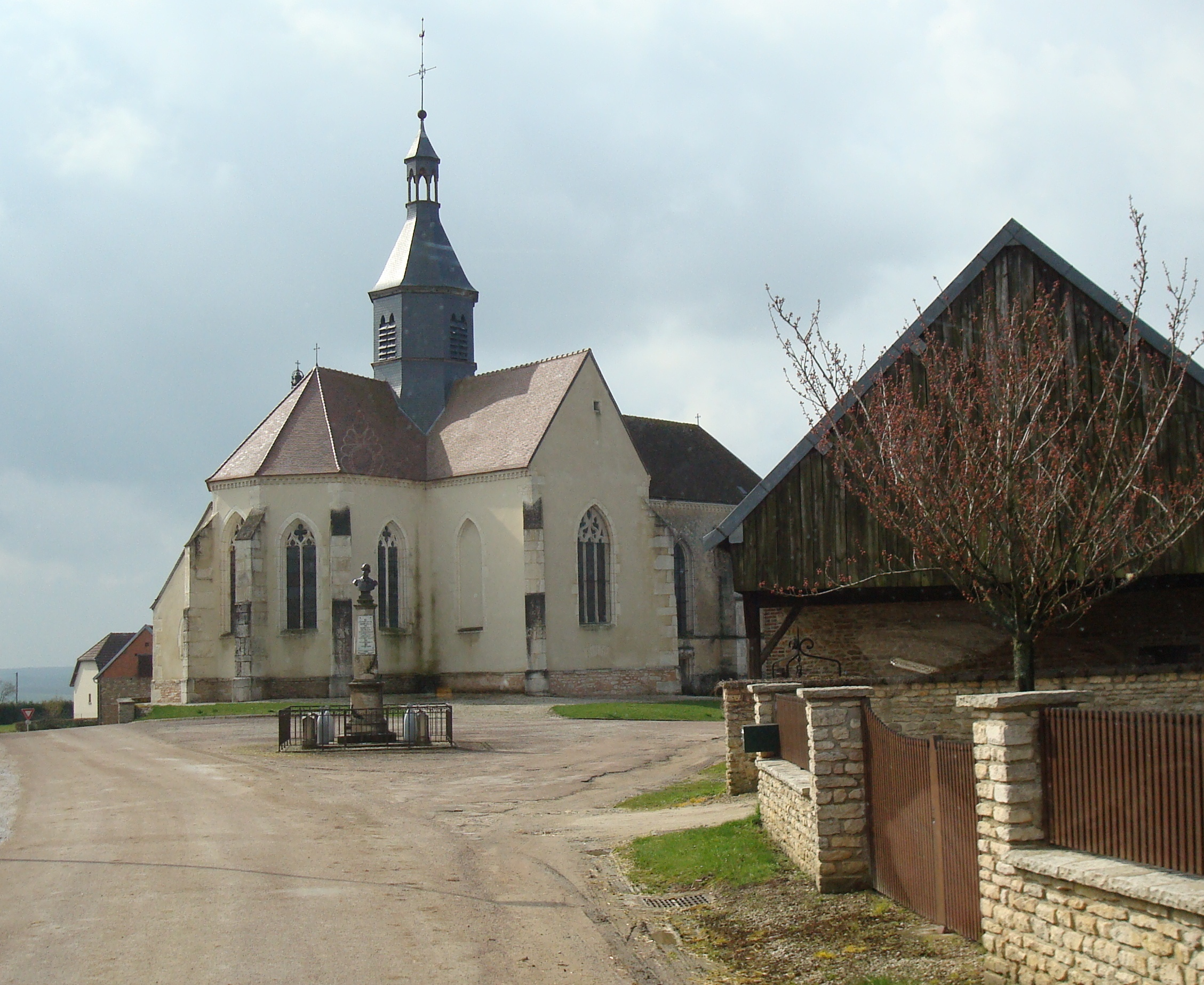 Cussangy